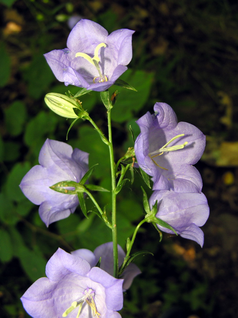 Didžiažiedis katilėlis (Campanula persicifolia) Šeima. Katilėliniai (Campanulaceae) Foto: Algirdas, 2006 m. liepos 1 d., Lietuva